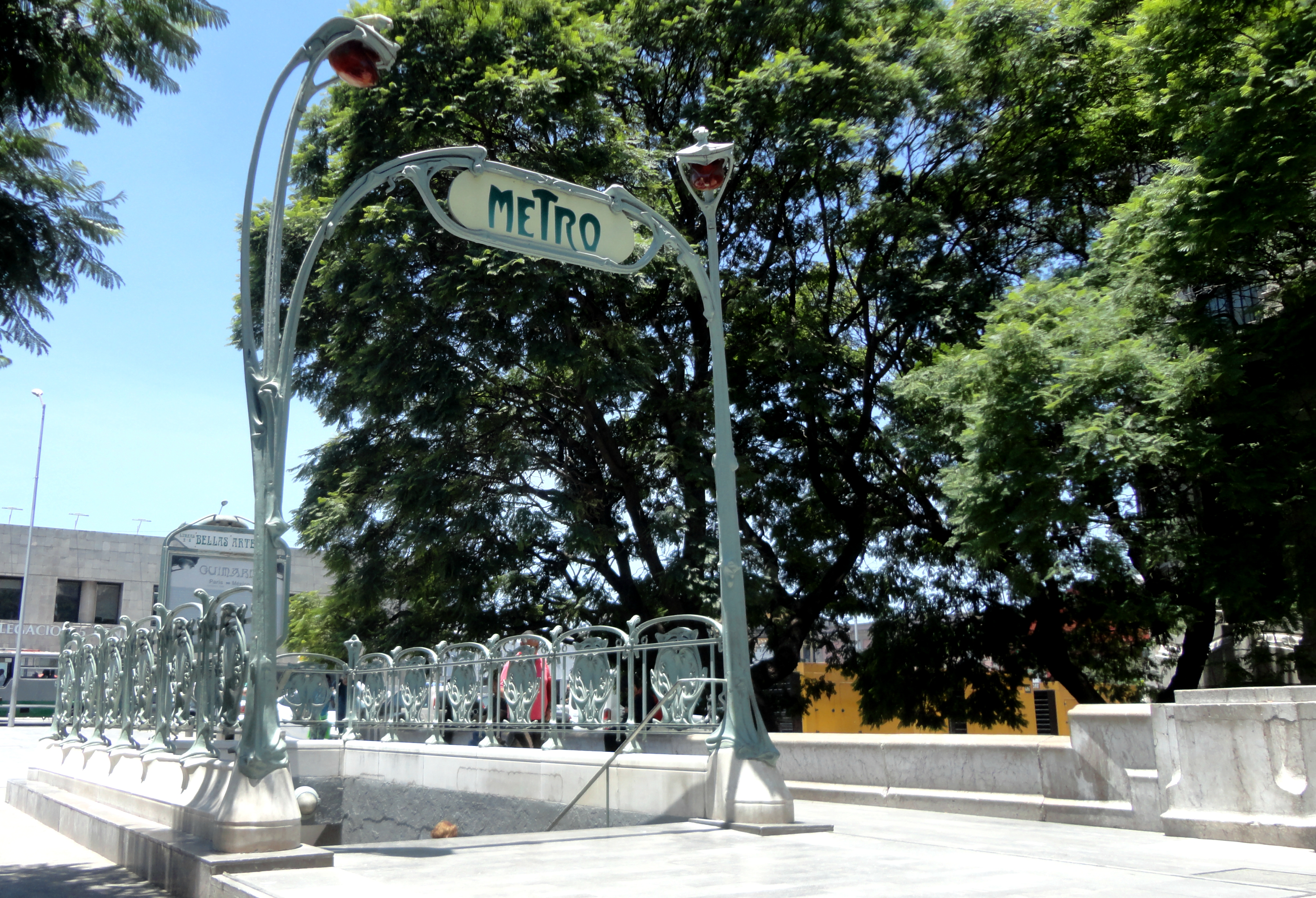 Metro Bellas Artes estilo Guimard, Ciudad de México